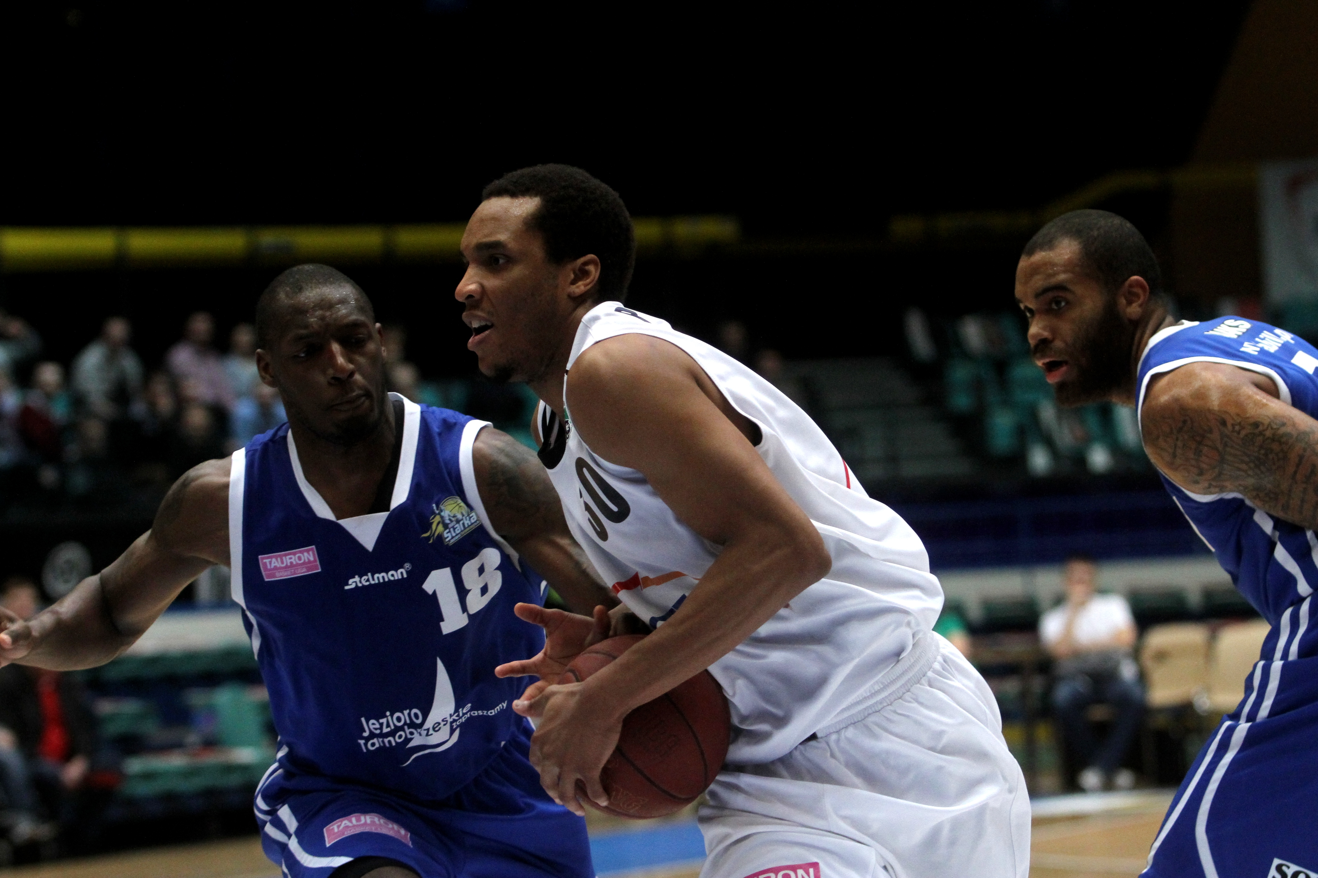 J.P. Prince, PGE Turów Zgorzelec